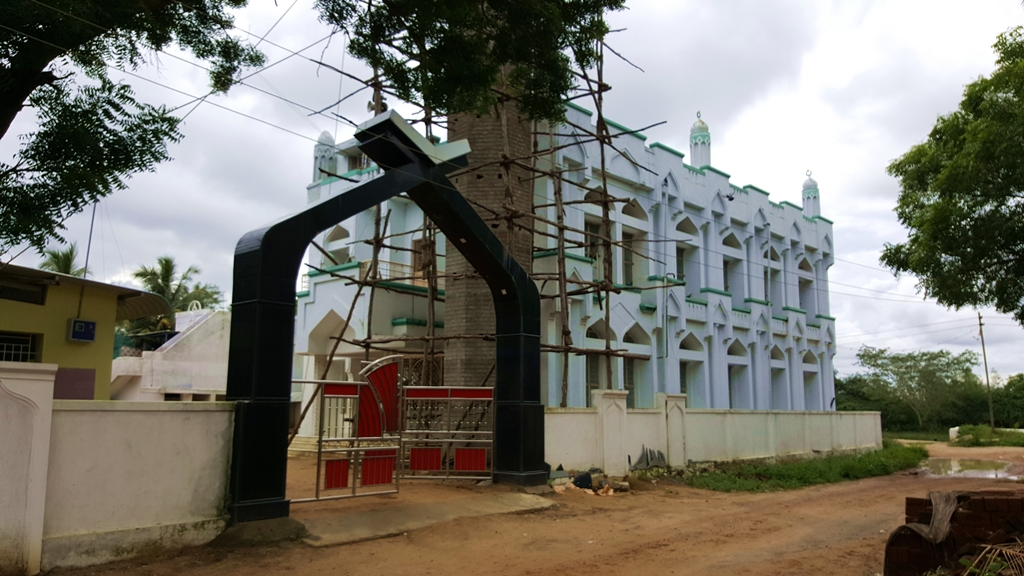 காசிம்புதுப்பேட்டை பள்ளிவாசல்